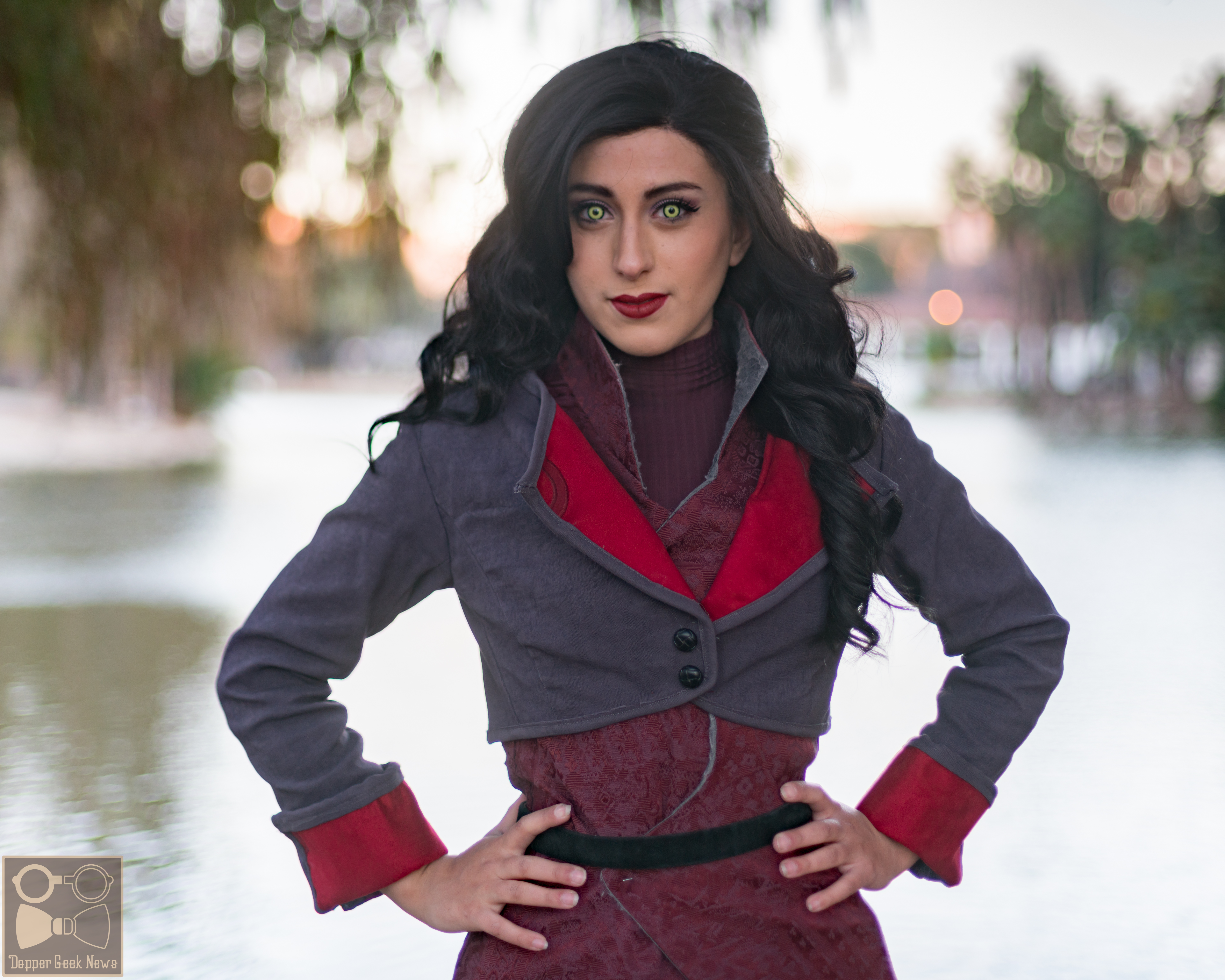 Asami Sato